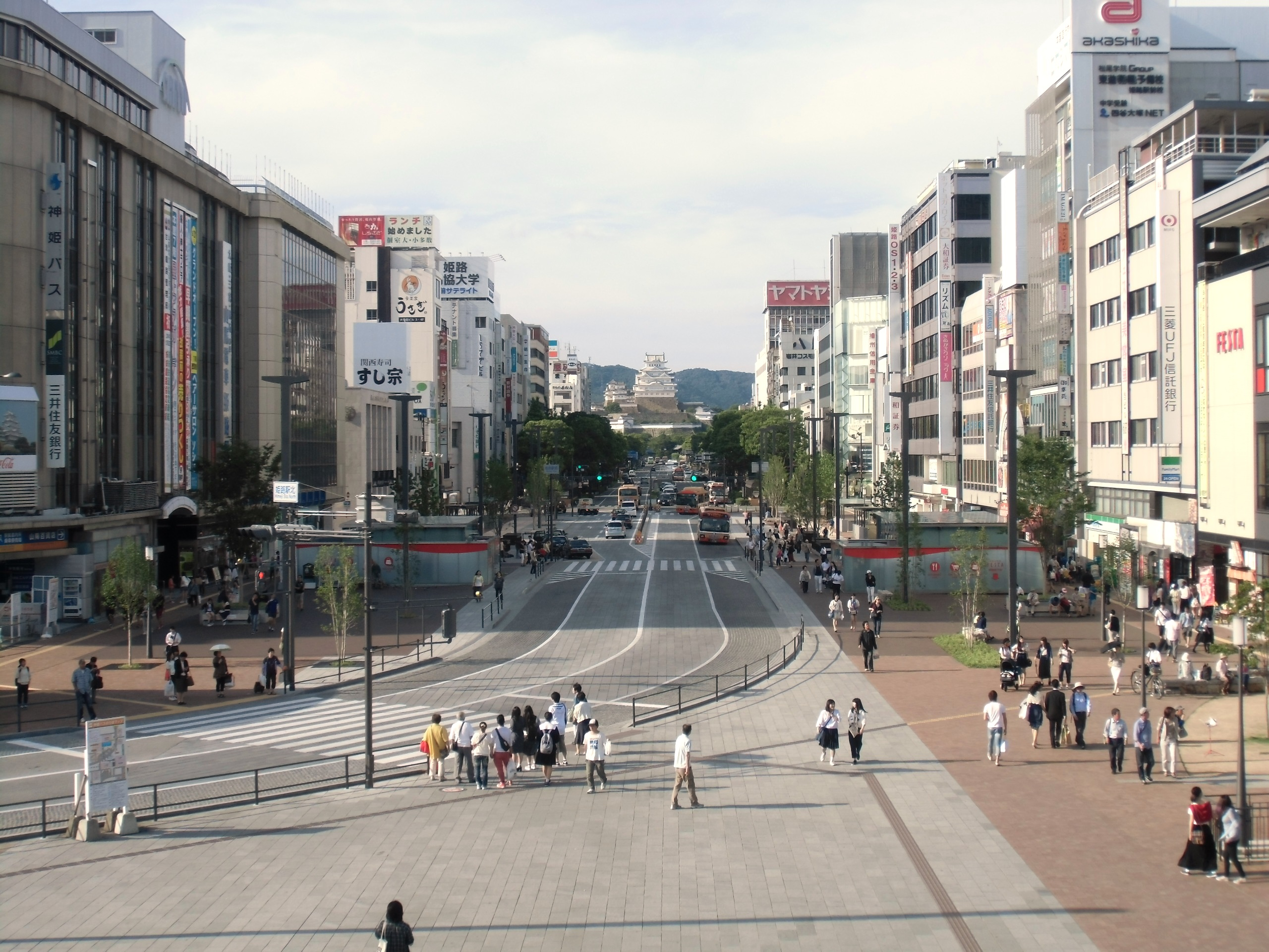 姫路市のメインストリート大手前通り。キャッスルビューから撮影